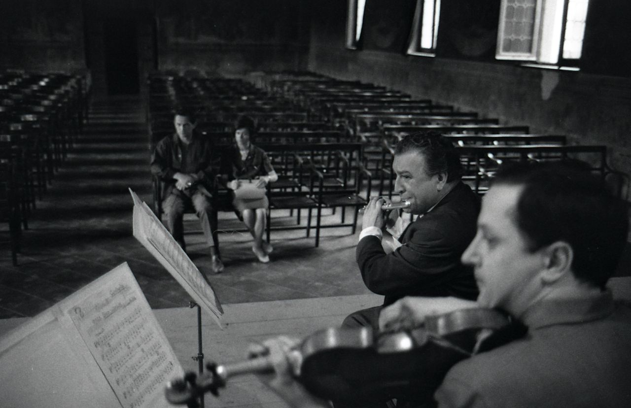 Servizio fotografico : Milano, 1964 / Paolo Monti. - Strisce: 3, Fotogrammi complessivi: 16 : Negativo b/n, gelatina bromuro d'argento/ pellicola ; 35 mm. - ((I fotogrammi hanno una doppia numerazione. - Sul portanegativi: Pentax HPS. - Sul dorso e sul portanegativi Monti individua questa serie con la lettera "A". - Fonte: Agenda di Paolo Monti: Foto Leica 2 / 111 - 285 (1934-1965), presso Archivio Paolo Monti